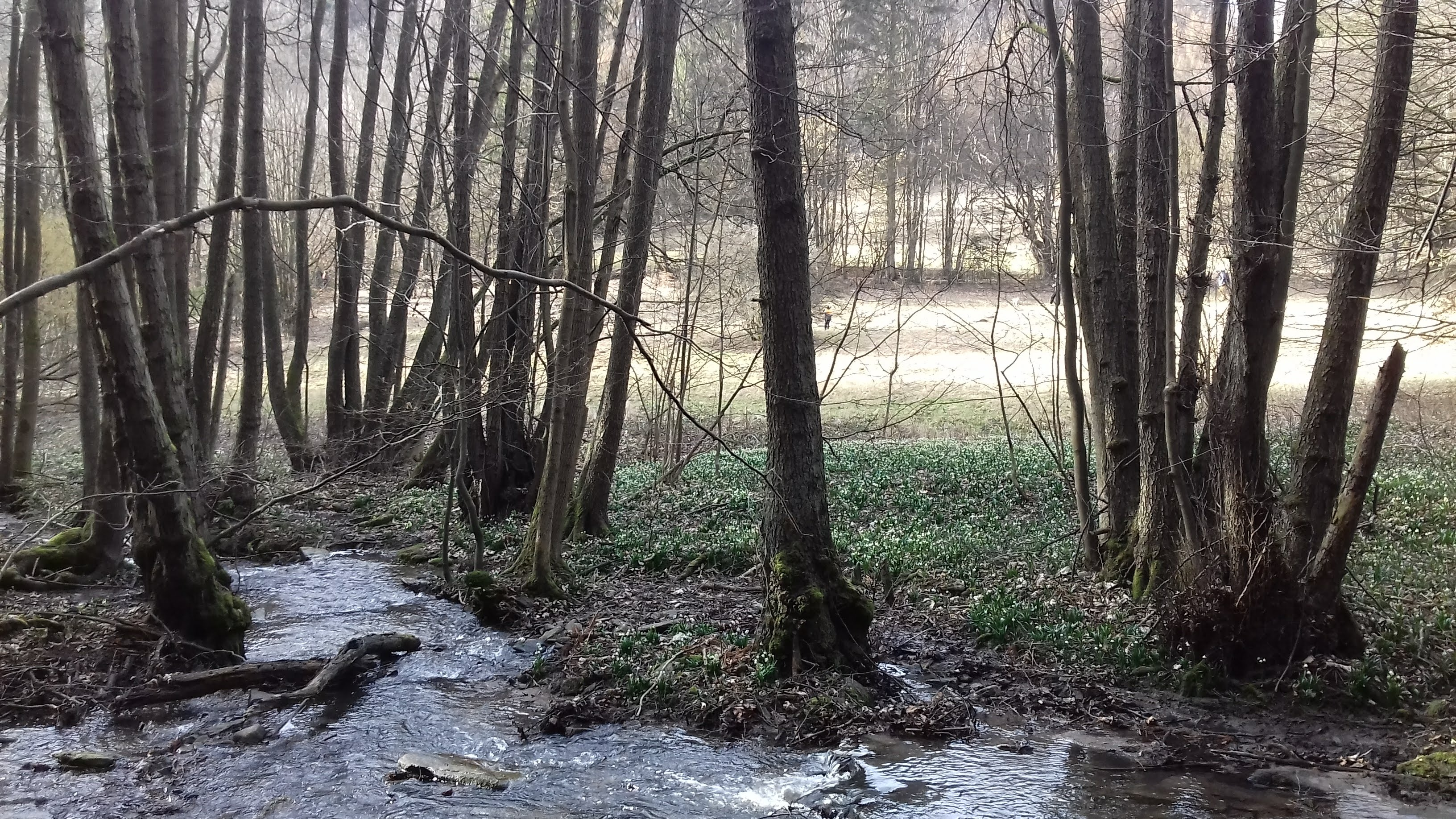 Potoční ptačincová olšina (Stellario nemorum-Alnetum glutinosae), PR Údolí chlébského potoka